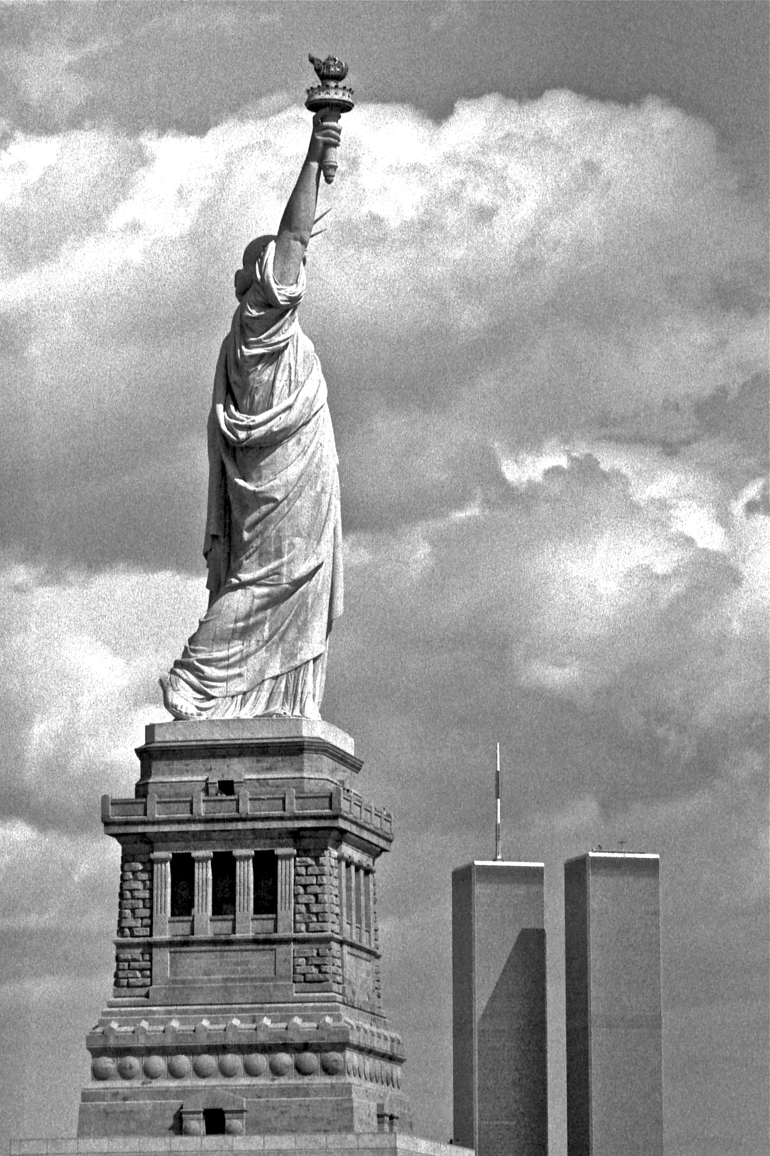 Blick auf Freiheitsstatue und World Trade Center